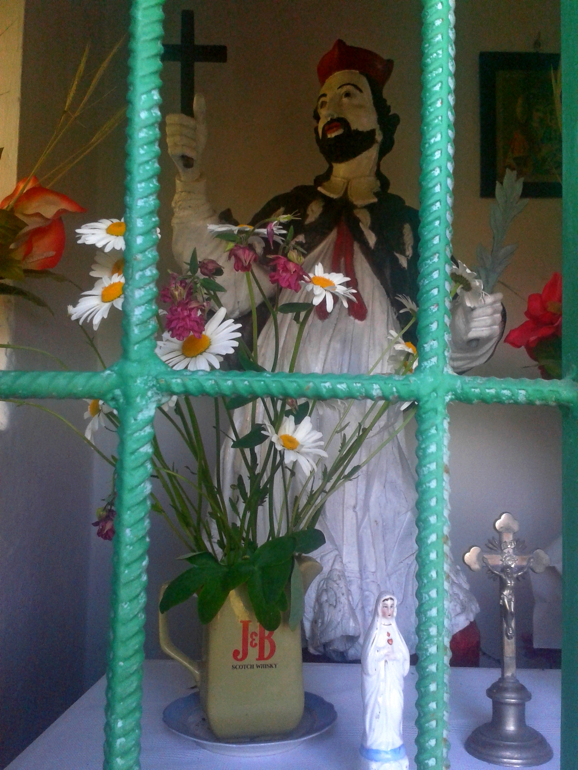 Figura Jana Nepomucena w XIX-wiecznej kapliczce w Zakalinkach